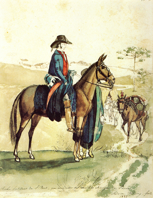 Riche Habitant de S. Paul qui conduit ses mules charges de sucre 1825